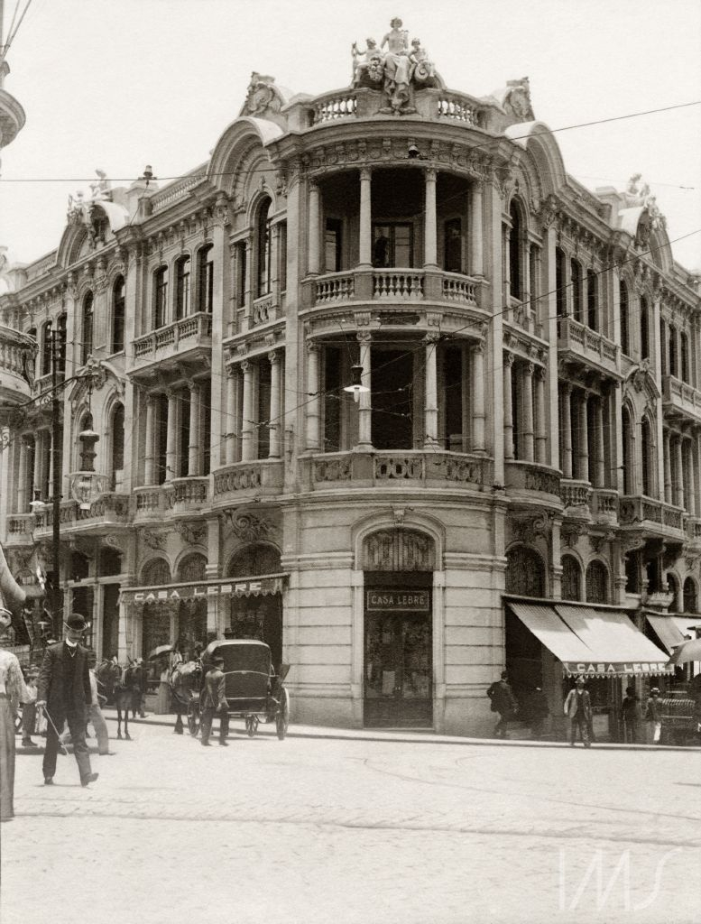 Esquina da rua Direita com 15 de Novembro